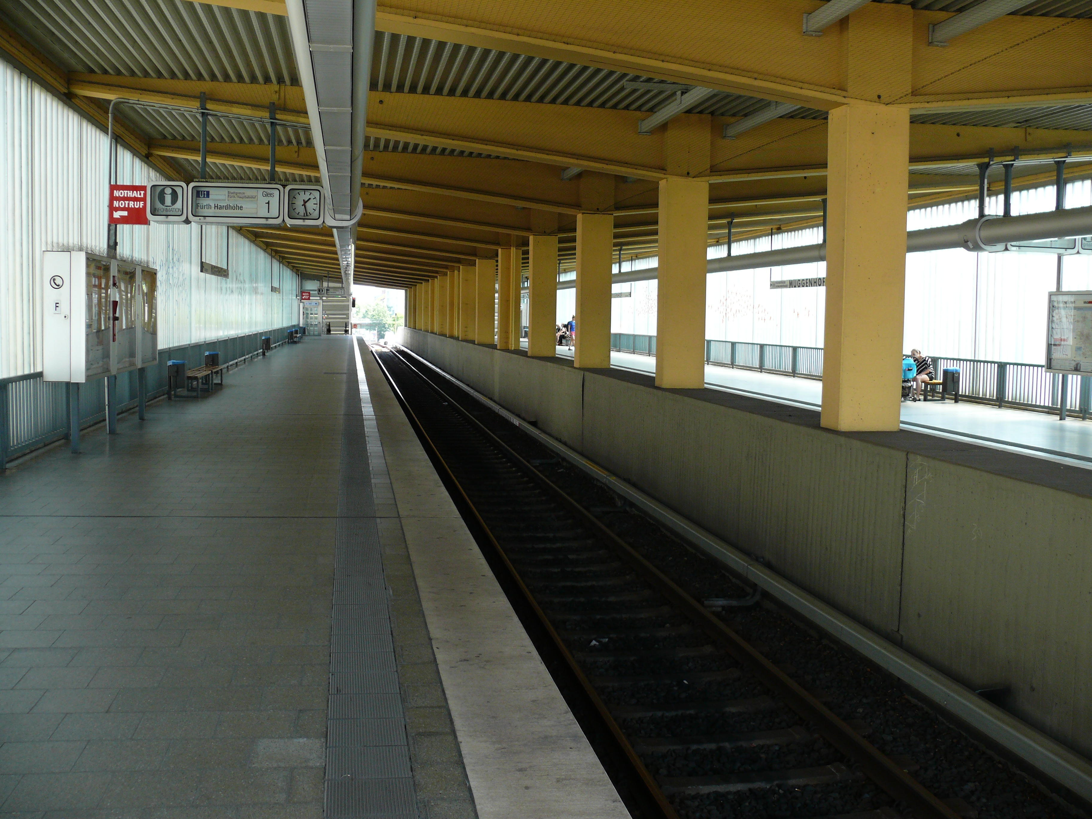 Bahnsteigebene am U-Bahnhof Muggenhof in Nürnberg.